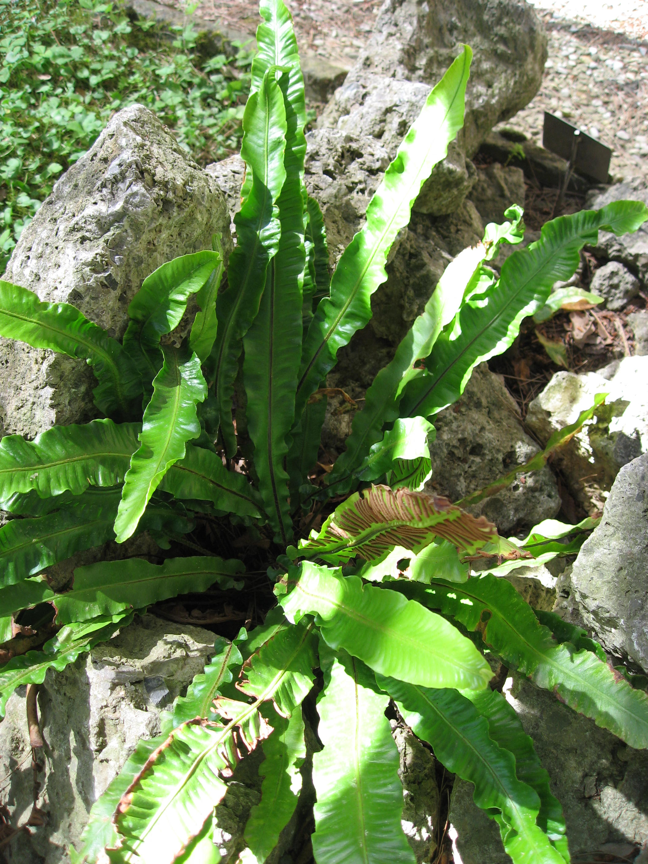 Phyllitis scolopendrium subsp. scolopendrium in Giardino dei Semplici di Firenze Map: 43° 46' 45" N 11° 15' 39" E